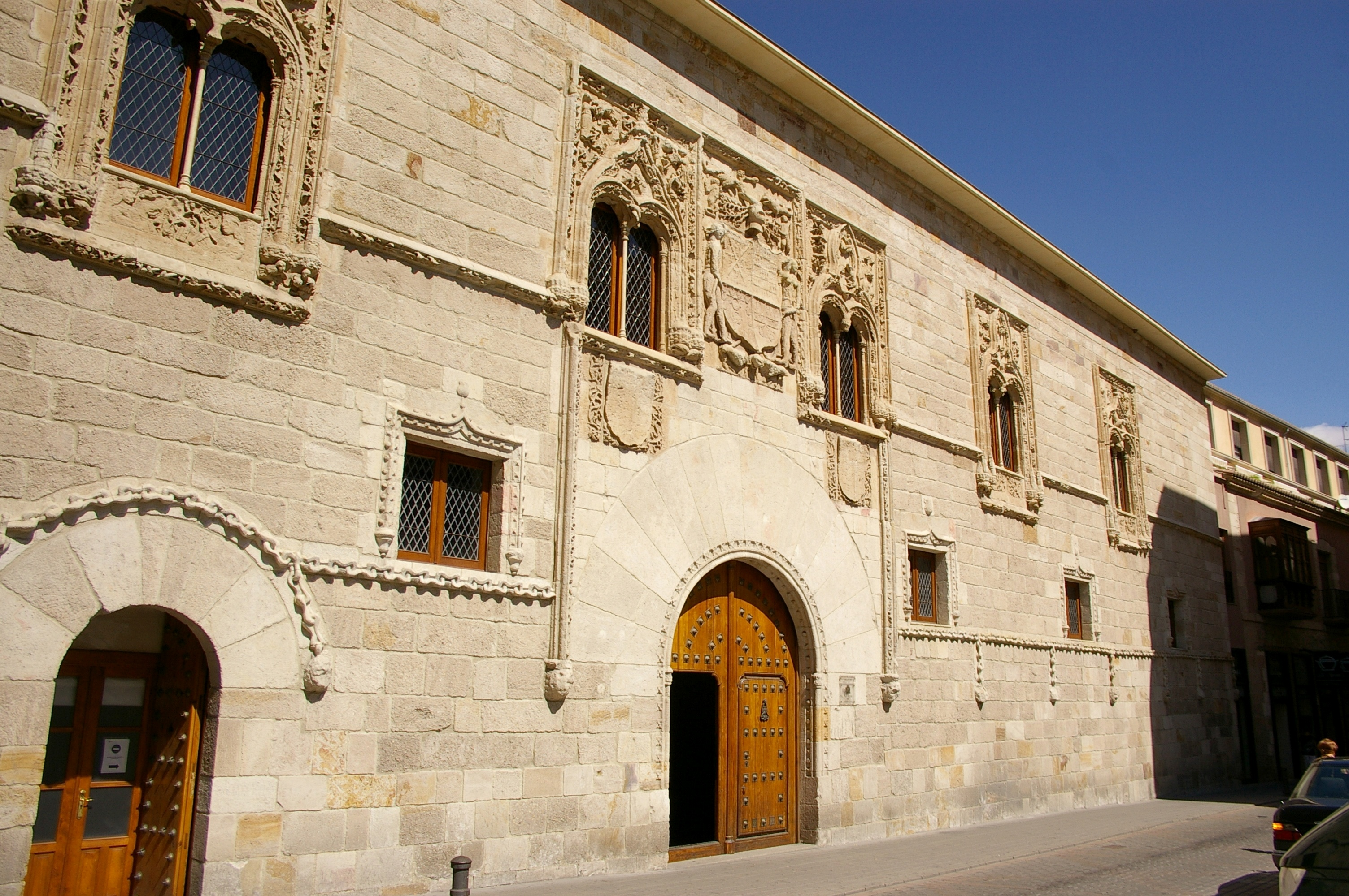 Palacio de Justícia de Zamora, conocido como de los Momos.